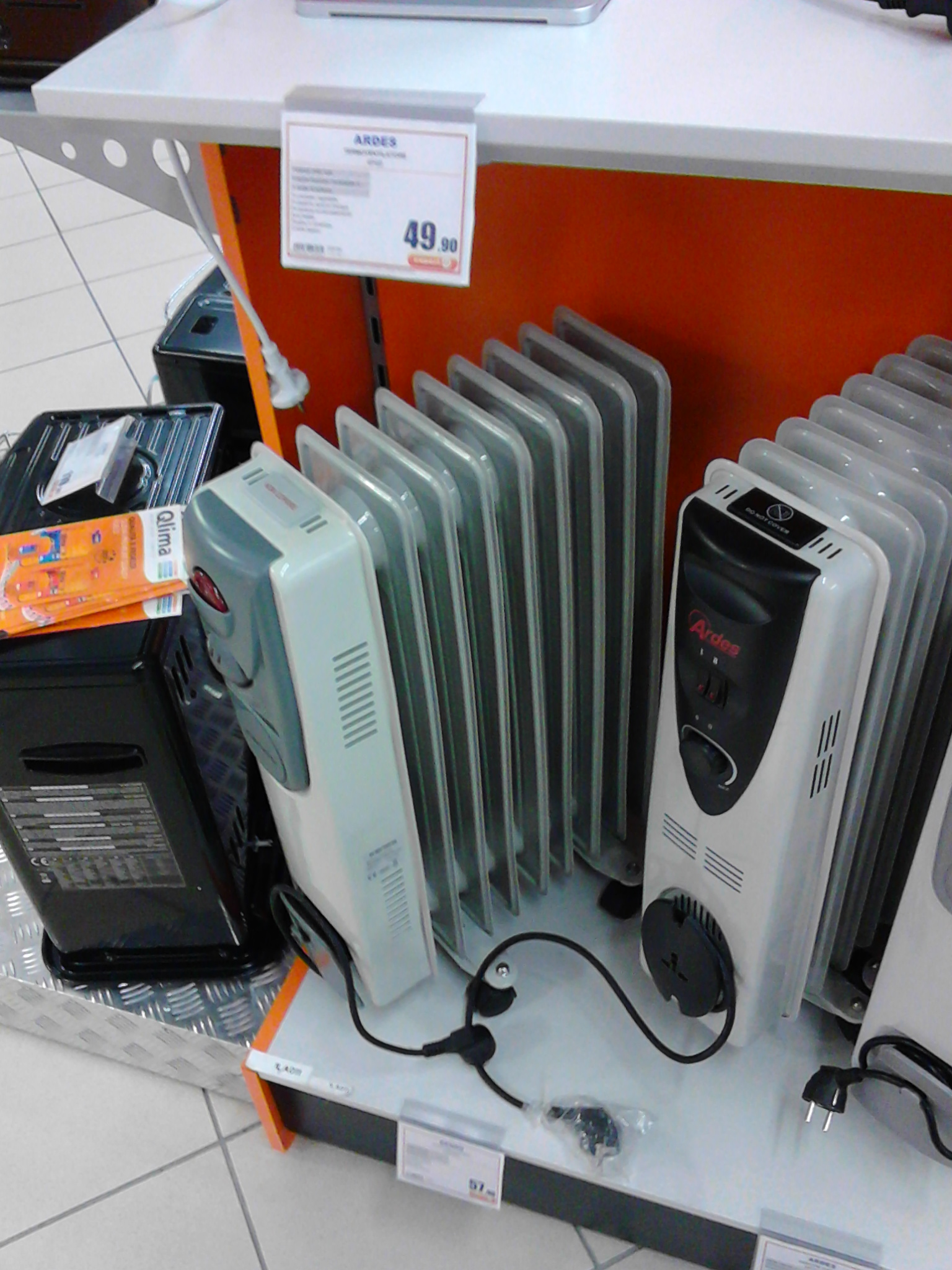 Radiatore elettrico ad olio in esposizione in un negozio